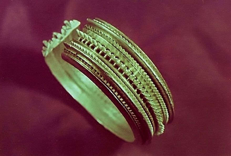 Brazalete número 29 del Tesoro de Villena, sin duda la pieza cumbre del conjunto.